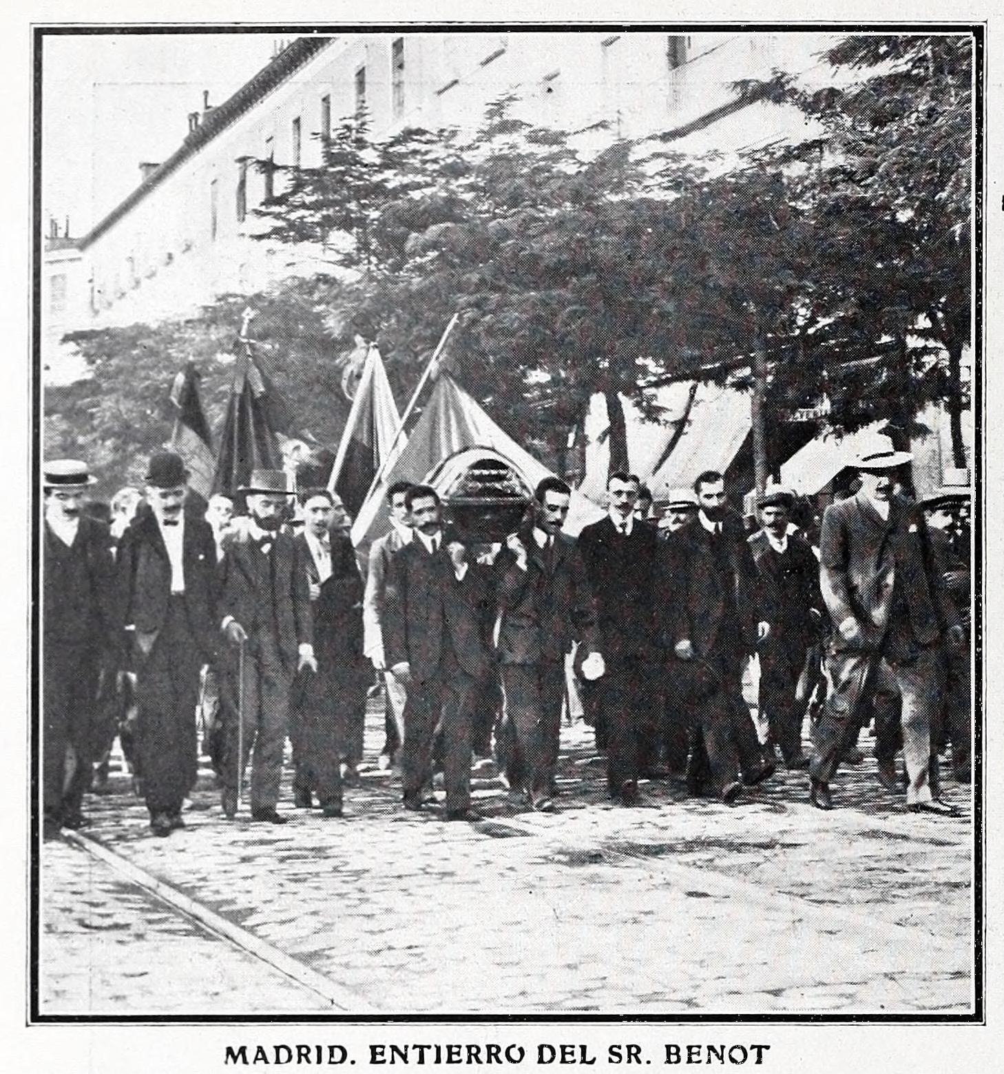 Entierro del señor Benot.